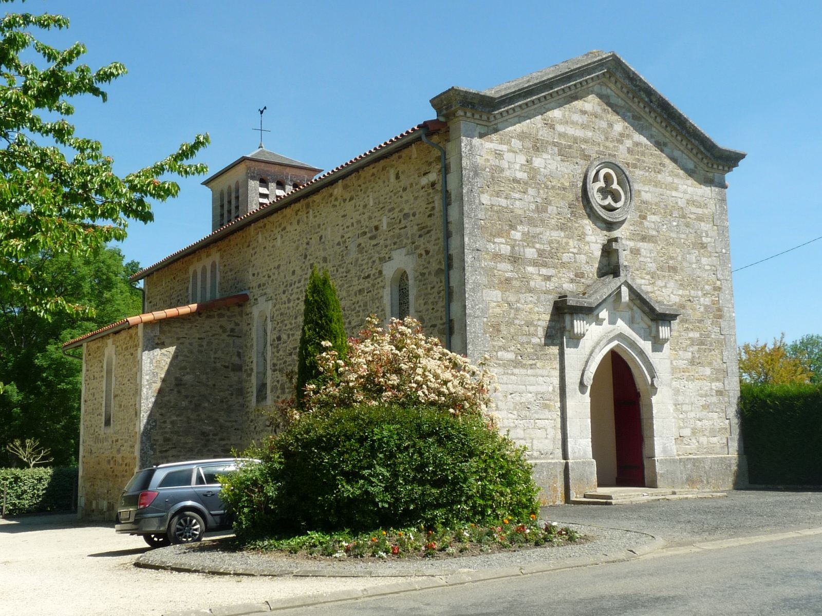 église du Lindois, Charente, France